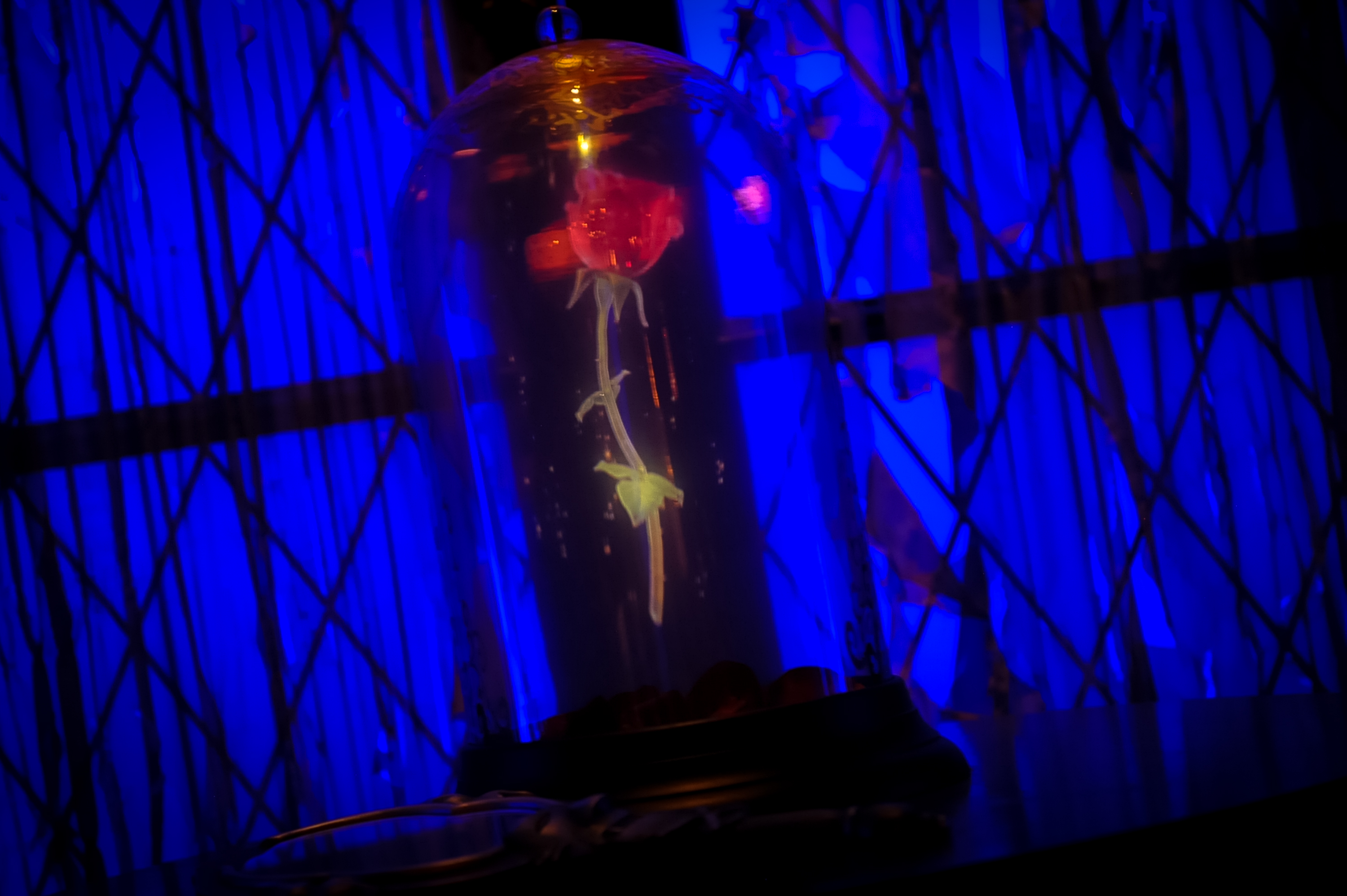 Be Our Guest Restaurant - Magic Kingdom